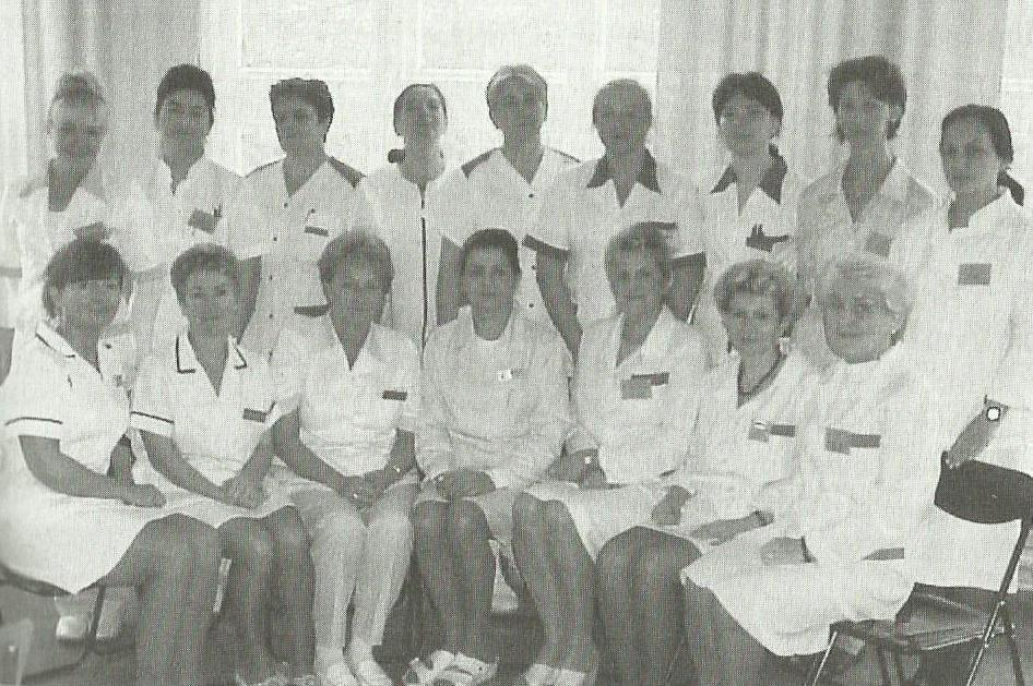 Szczecin,2004 r. Pielęgniarki i Położne 109 Szpitala Wojskowego